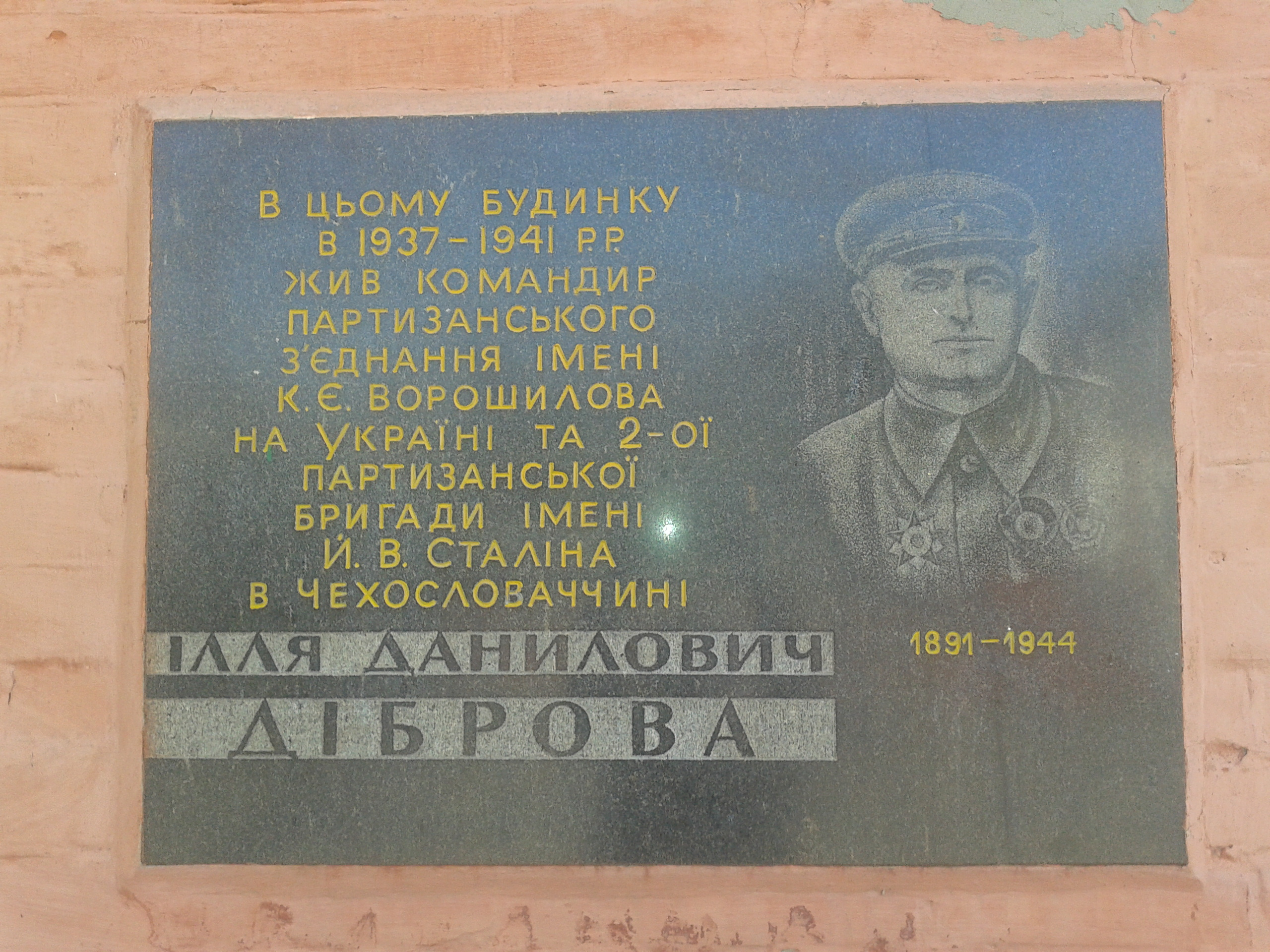 Будинок, де жив Діброва І.Д. – керівник партизанського з'єднання